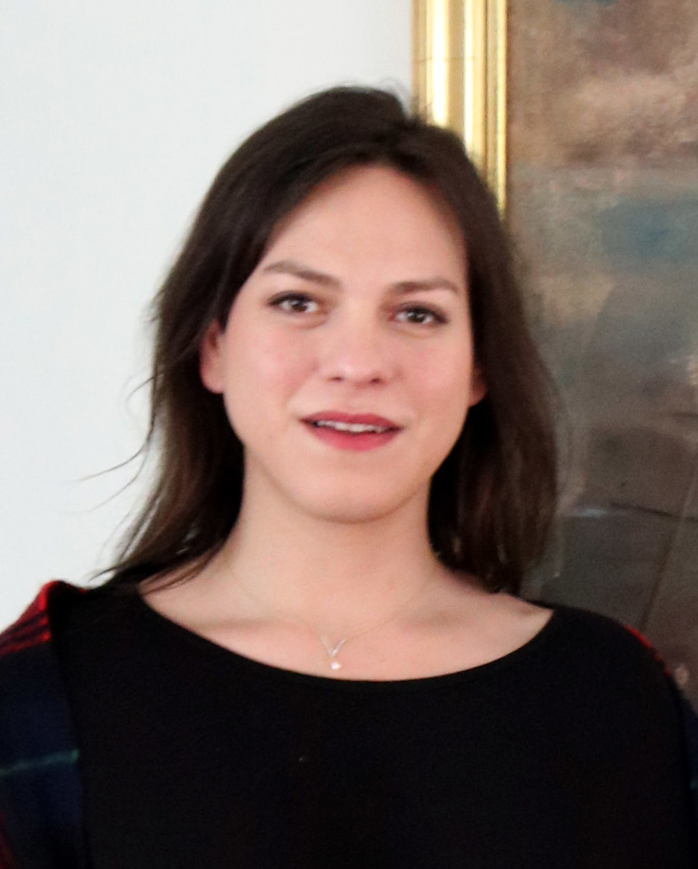 La actriz chilena, Daniela Vega y Víctor Ugarte